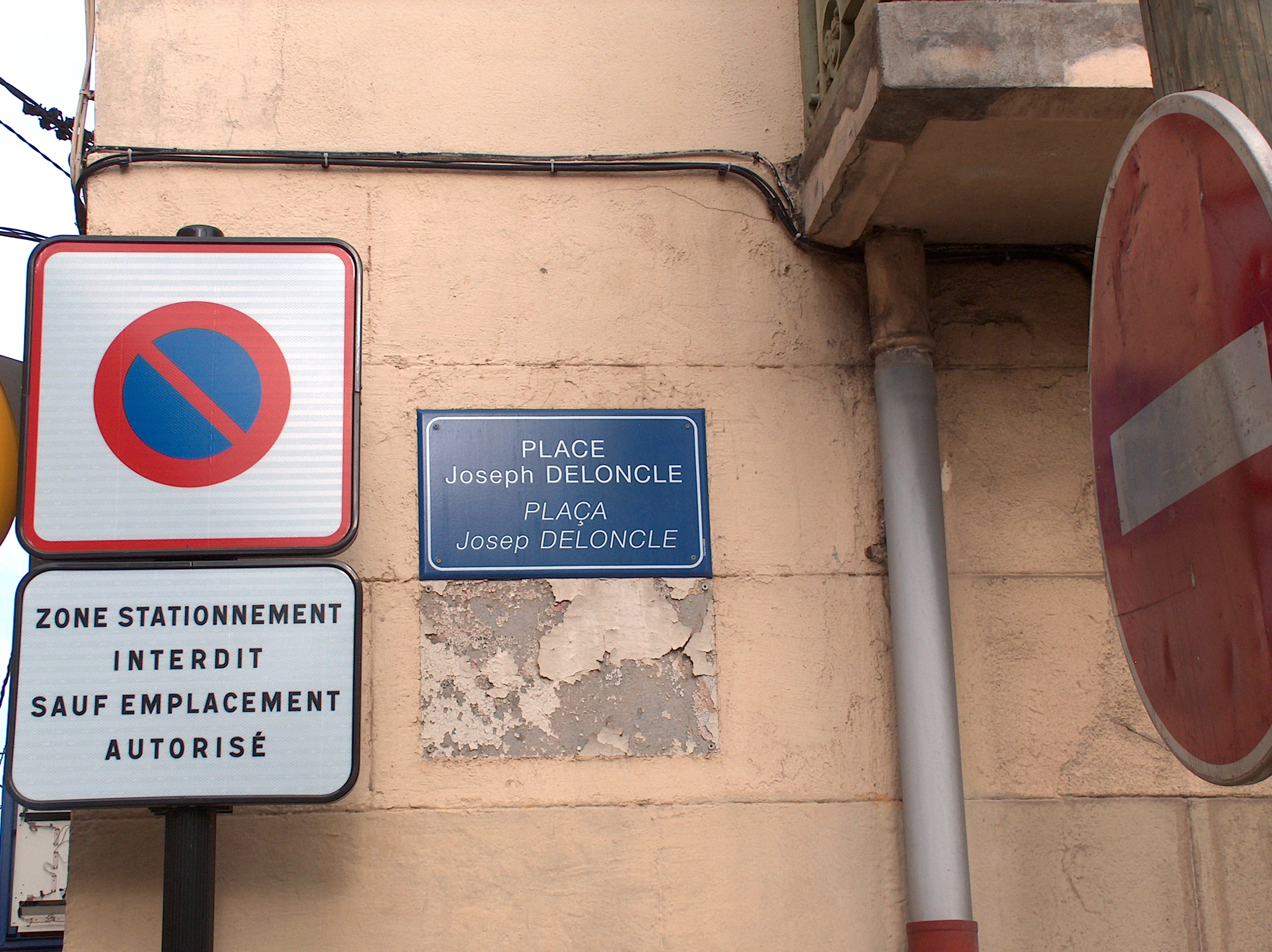 Joseph Deloncle était pharmacien et sa pharmacie était localisée à cet endroit. Quartier Saint Jacques à Perpignan.